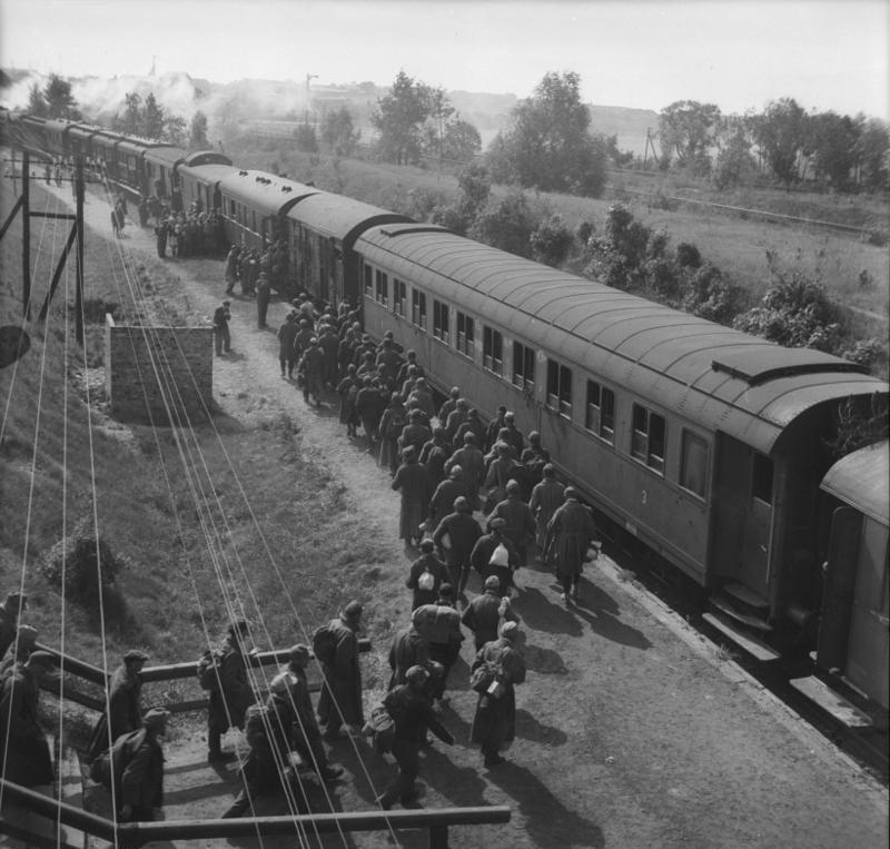 Frankfurt / Oder, entlassene Kriegsgefangene ADN-ZB/Illus-Heinscher Im Lager Gronenfelde bei Frankfurt/O. UBz: Nach erfolgter Entlassung werden die ehemaligen Kriegsgefangenen auf dem Bahnhof Gronenefelde in die bereitstehenden Eisenbahnwagen verladen und in ihre Heimatorte gebracht. 20.5.48 1513-48